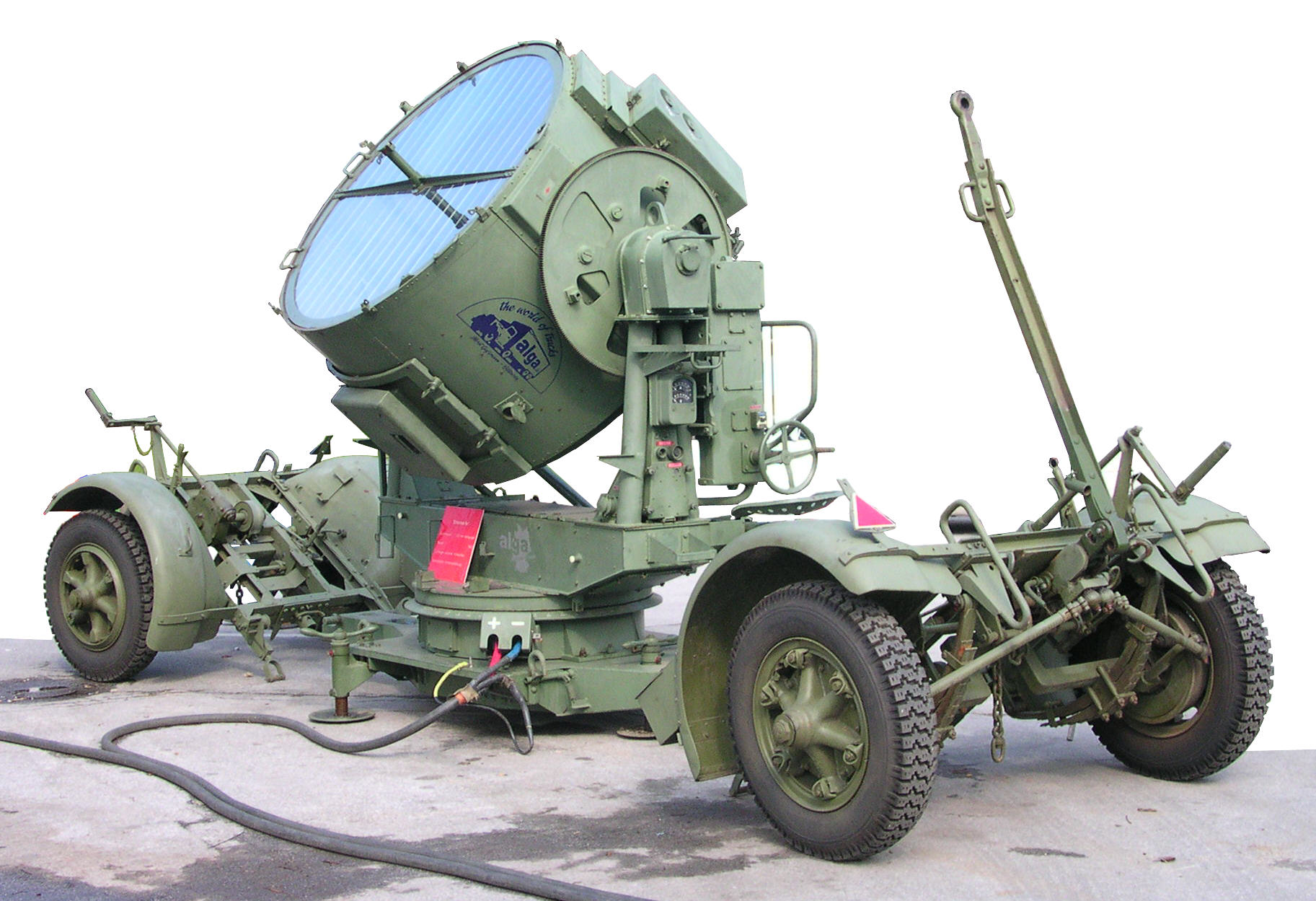 150 cm Flakscheinwerfer 34 der deutschen Wehrmacht. Dieser Scheinwerfer und das Stromaggregat wurden in Finnland von einem Bauern versteckt.